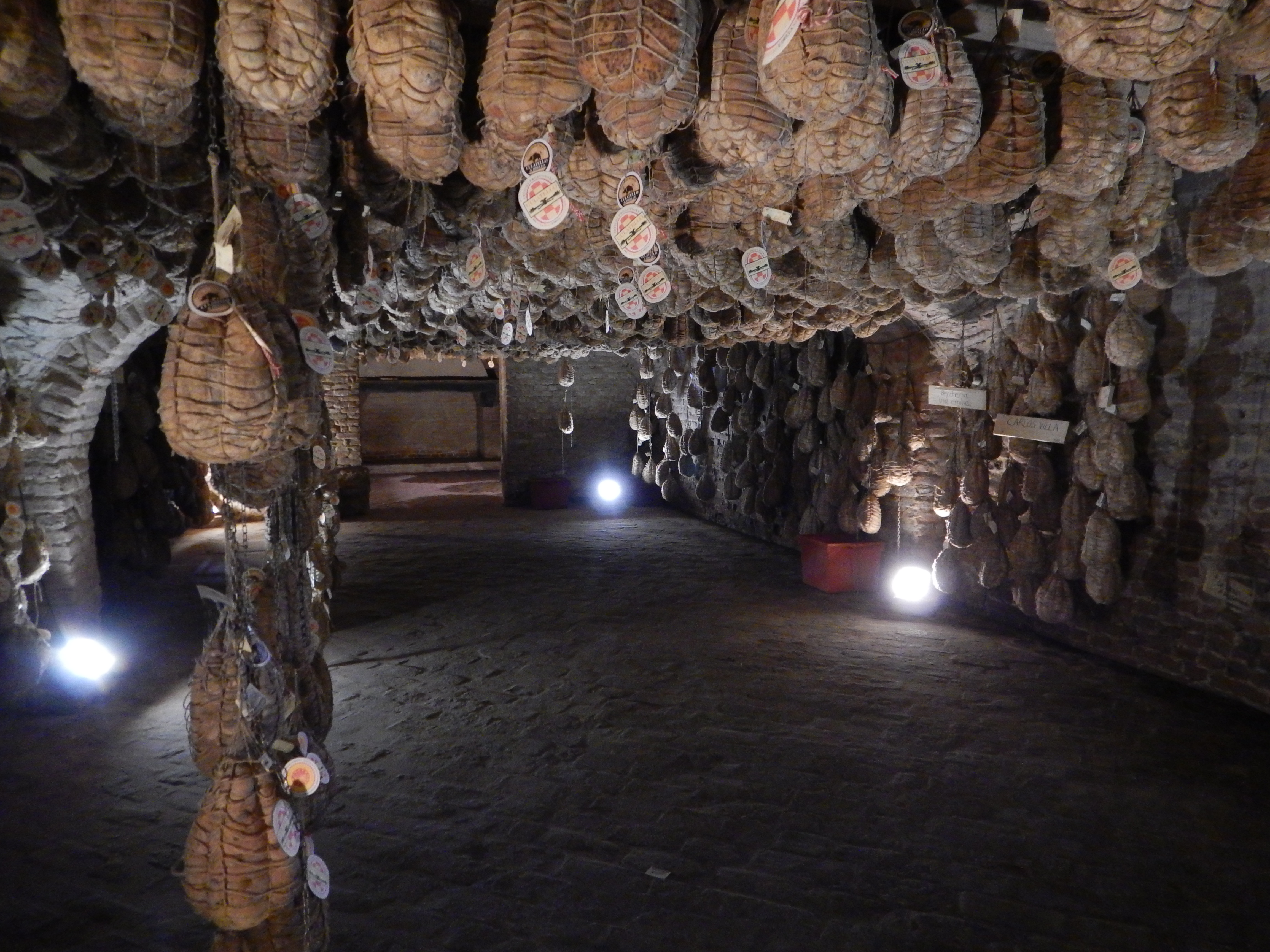 Salumi cellar